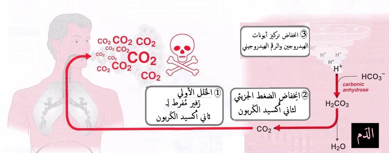 آلية الحُدوث القُلاء التَنَفُسي